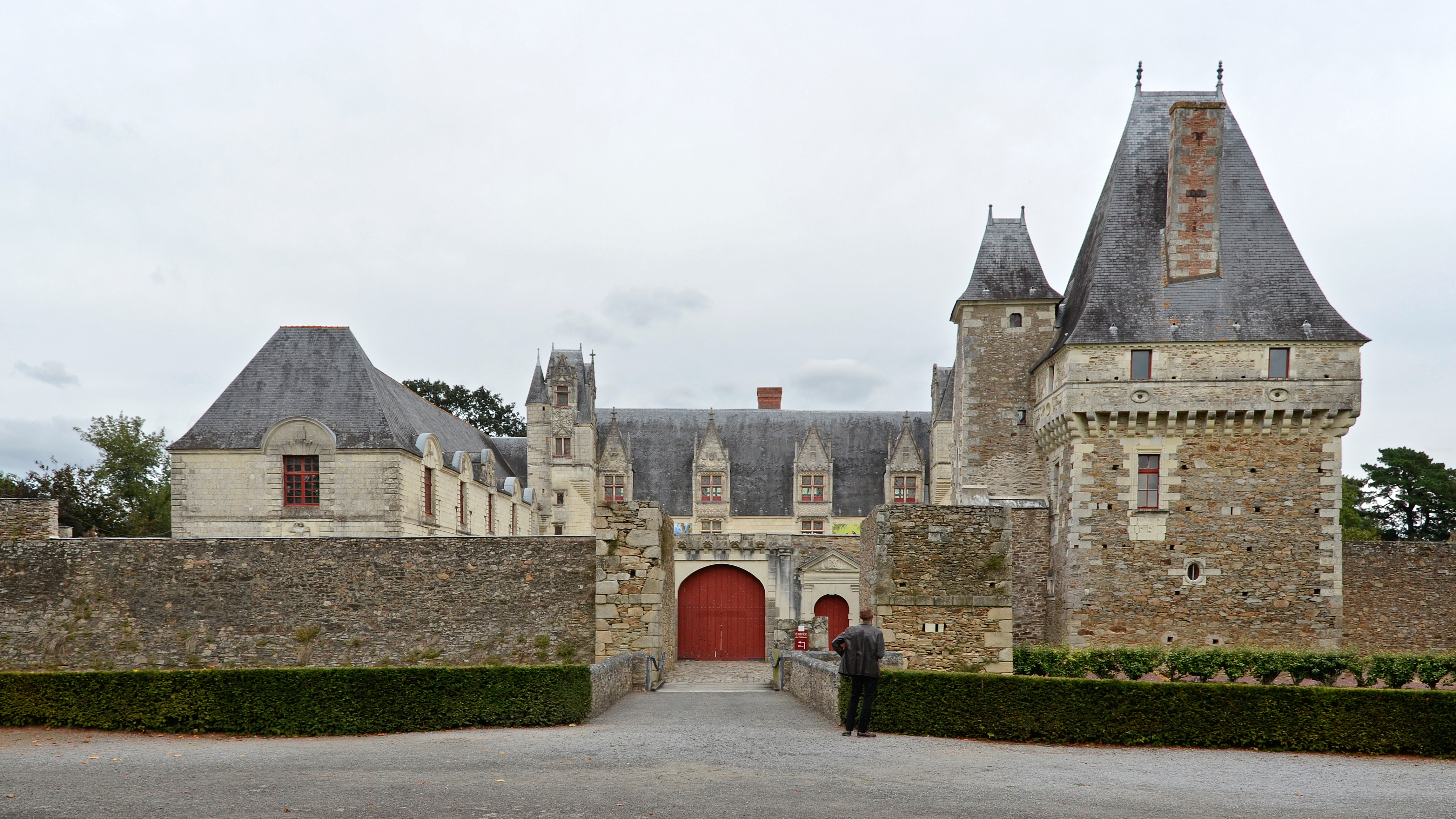 Château de Goulaine - Haute-Goulaine, Loire-Atlantique .